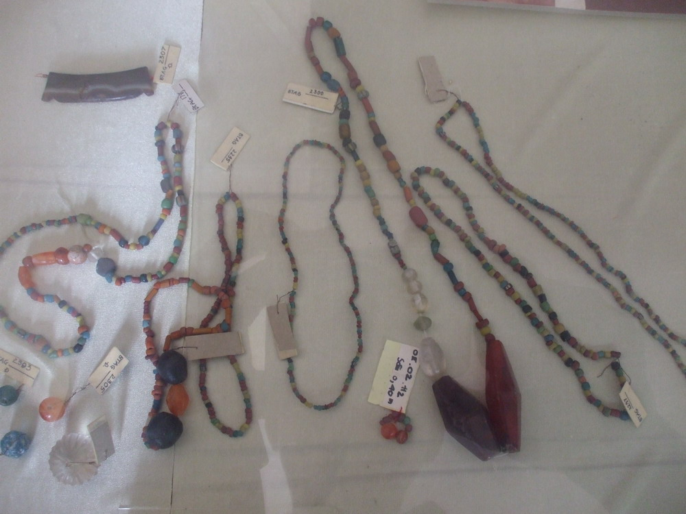 Đồ trang sức Phù Nam, đang được trưng bày tại Bảo tàng An Giang, Việt Nam.